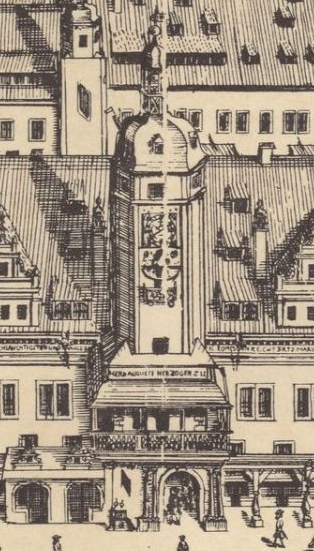 Ausschnitt aus einem Stich des Marktes und der Innenstadt von Leipzig von Johann George Schreiber, 1712: Ort des Abblasens der Leipziger Stadtpfeifer.